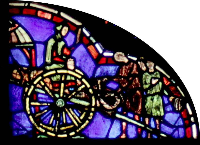 Excerpts from File:Vitrail Chartres-030-d rectifié.jpg